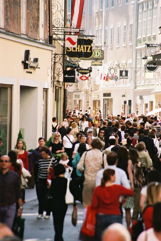 Die Getreidegasse, Touristen en masse